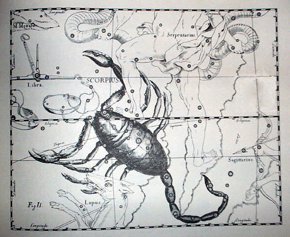 Tavola II del terzo volume "Firmamentum Sobiescianum, sive uranographia" dell'opera "Prodromus Astronomia" di Johannes Hevelius, pubblicato nel 1690 a Danzica. La tavola riproduce la costellazione equatoriale "Scorpius".